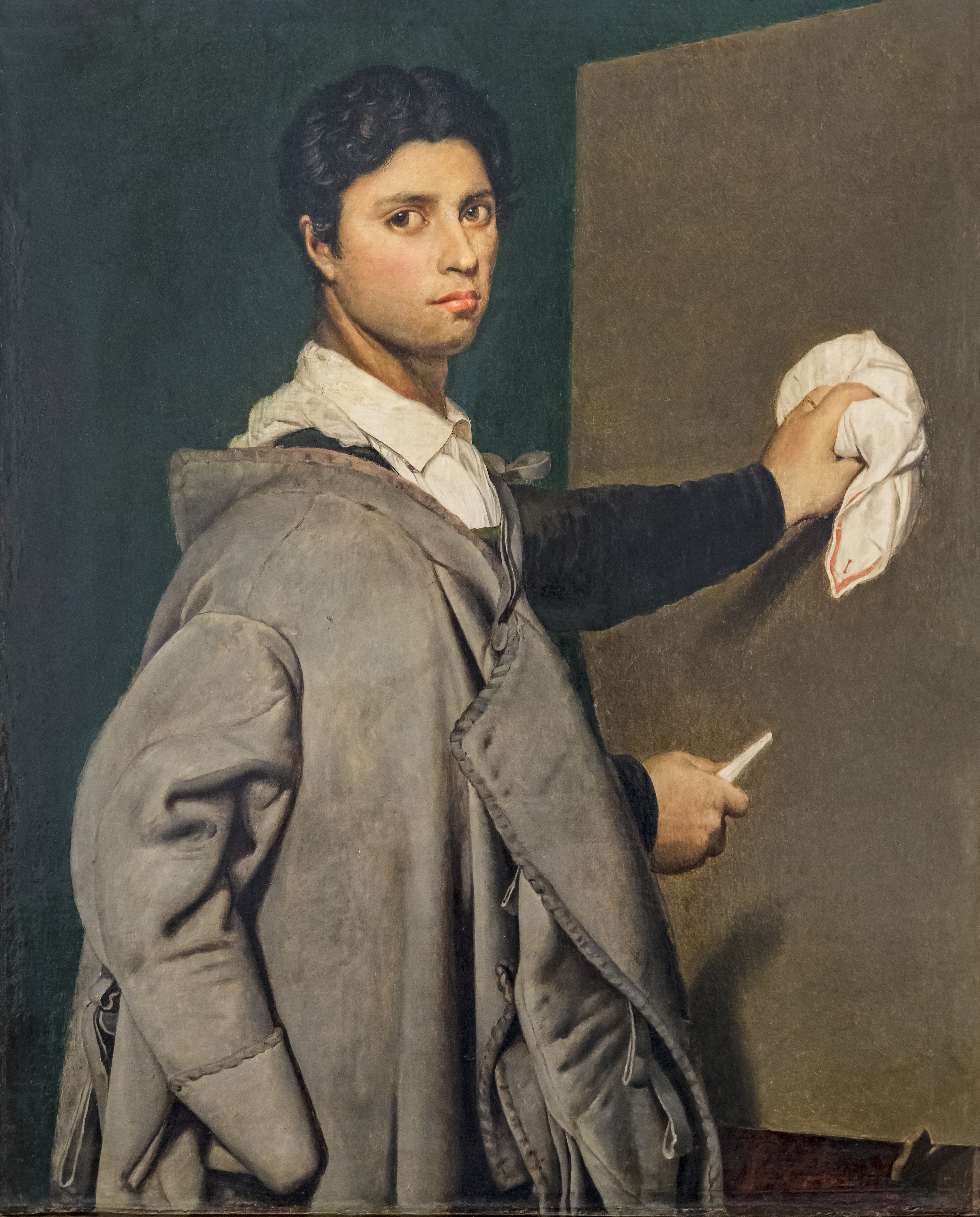 Copie de l'autoportrait d'Ingres Jean-Auguste-Dominique de 1804